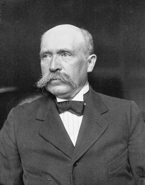 M. Noulens, ministre du Ravitaillement : photographie de presse